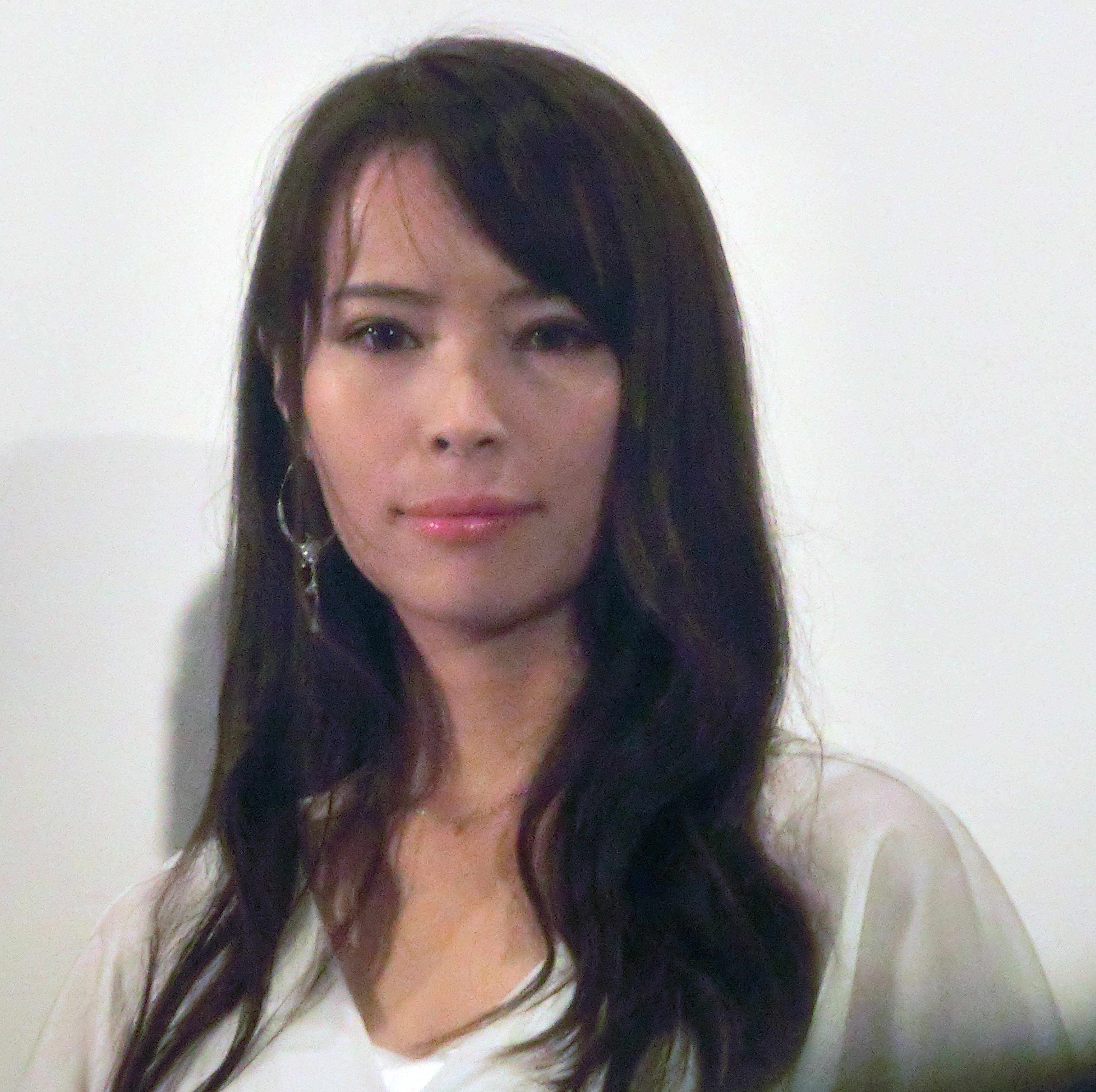 舞台挨拶をする真木今日子